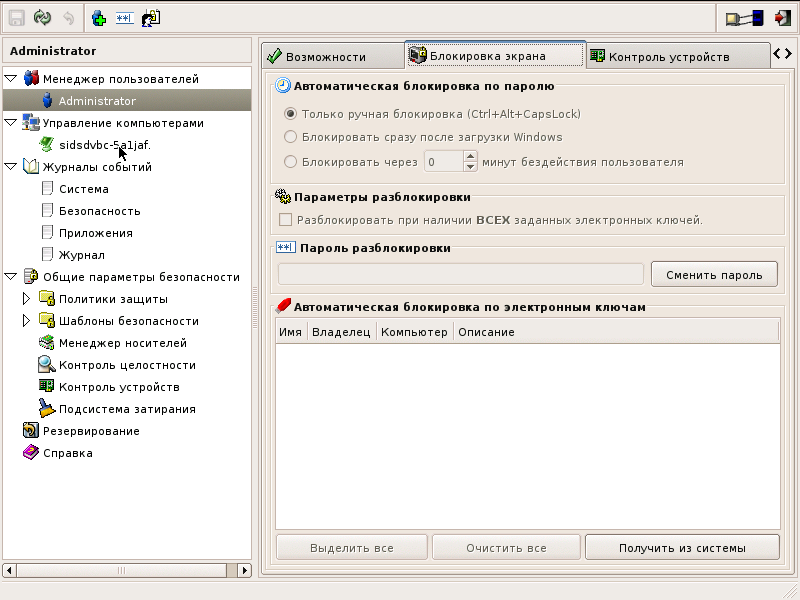 Скриншот настройки блокировки консоли СЗИ "Аура"